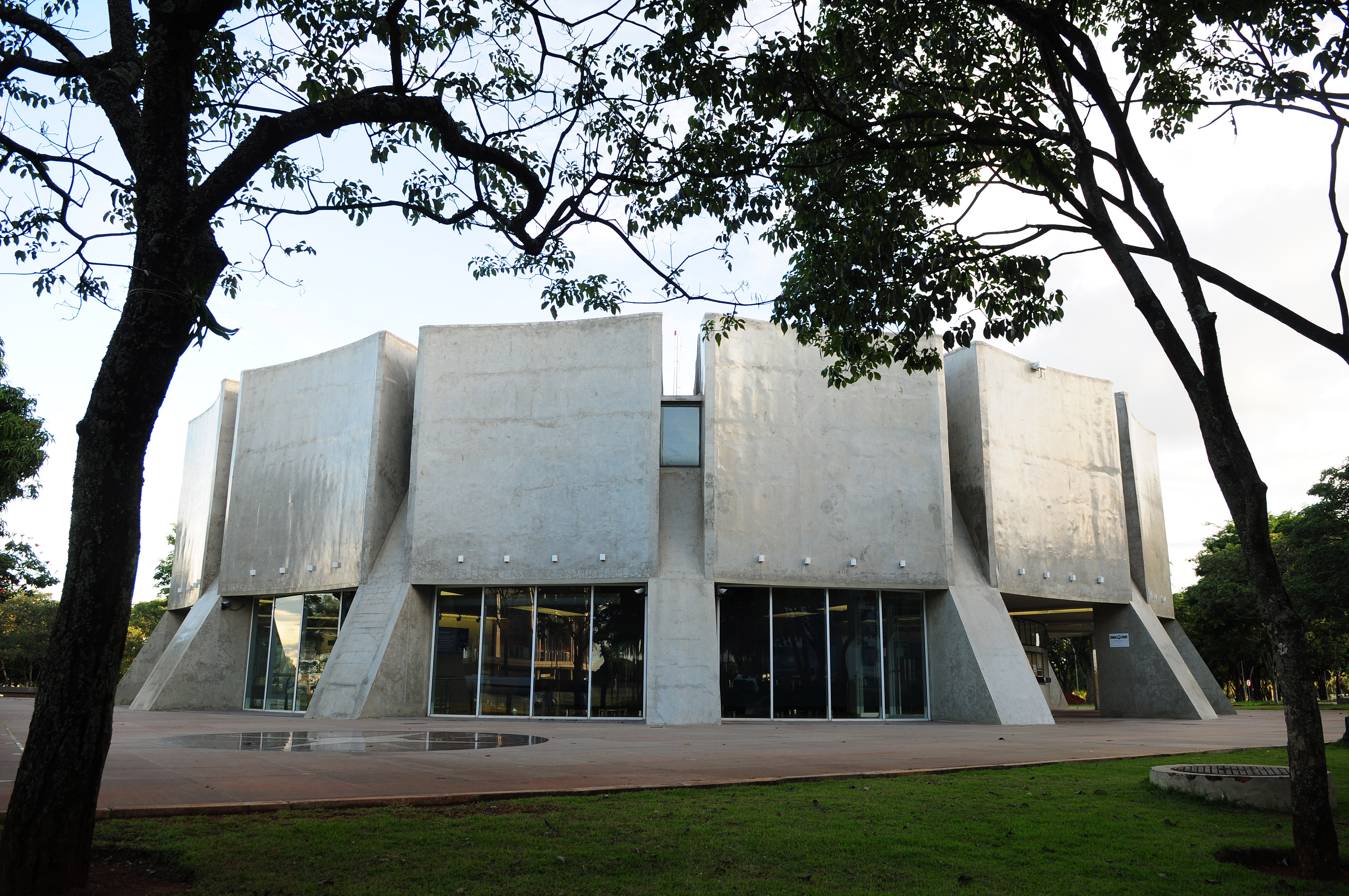 O Planetário de Brasília, projetado por Sérgio Bernardes no Eixo Monumental de Brasília. Foto de 2/3/2017, por Pedro Ventura/Agência Brasília.